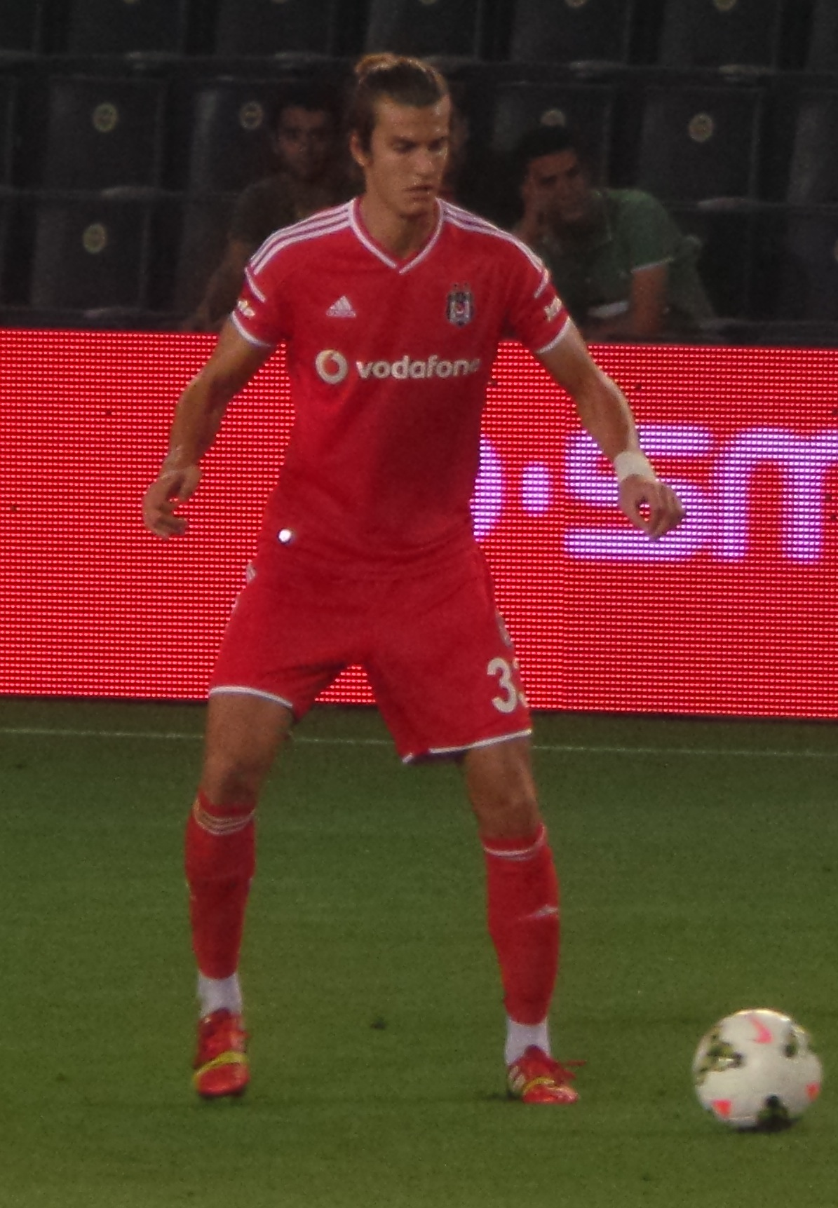 Atınç Nukan (1)